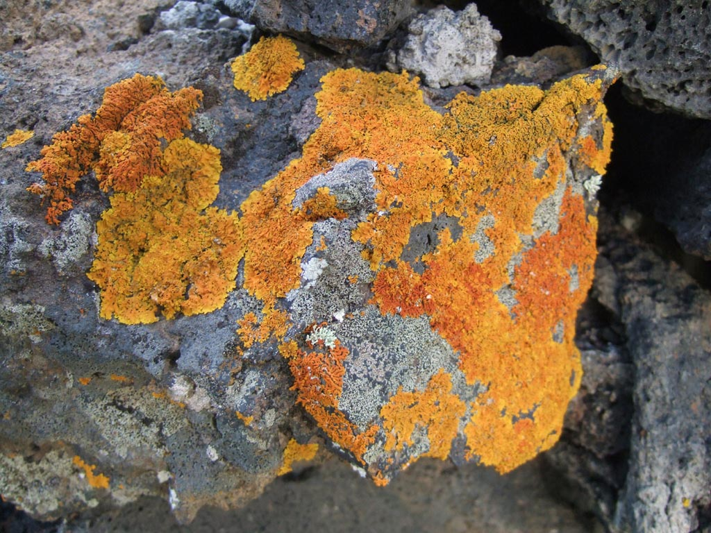 Lavafield near La Mancha, La Palma